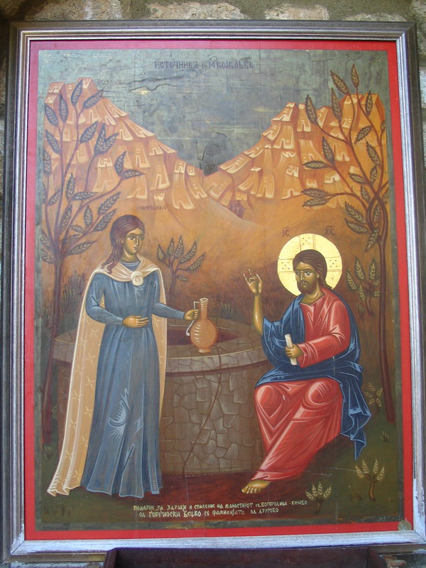 Св.Богородица Пречиста (Кичевска) Автор: Љупчо Зорески